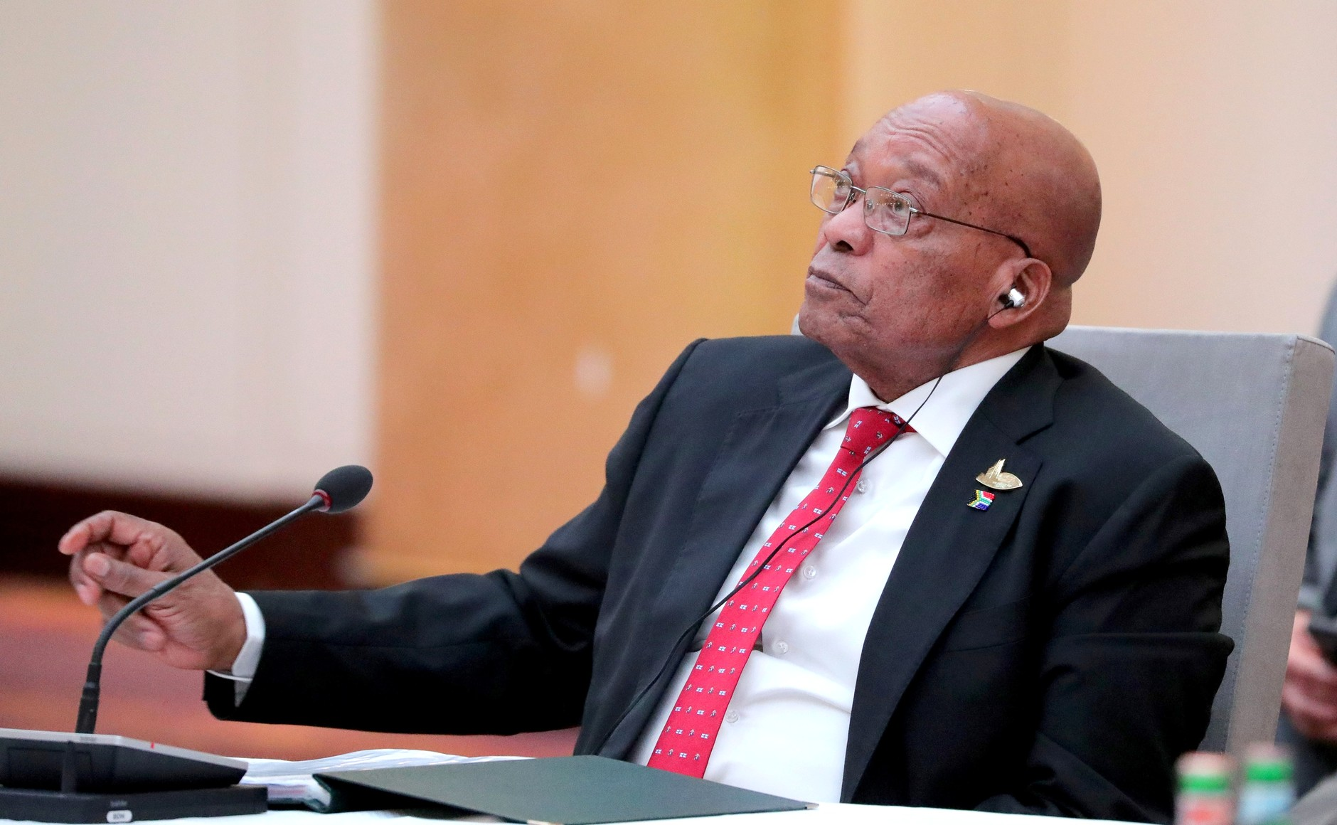 Президент Южно-Африканской Республики Джейкоб Зума на неформальной встрече глав государств и правительств стран – участниц БРИКС перед началом саммита «Группы двадцати» в Гамбурге